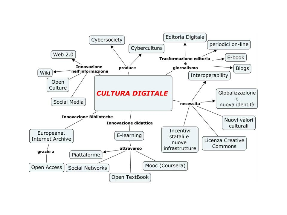 Mappa concettuale che descrive quello che ha prodotto la cultura digitale